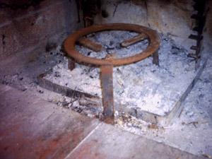 Саджак Автор:Ема